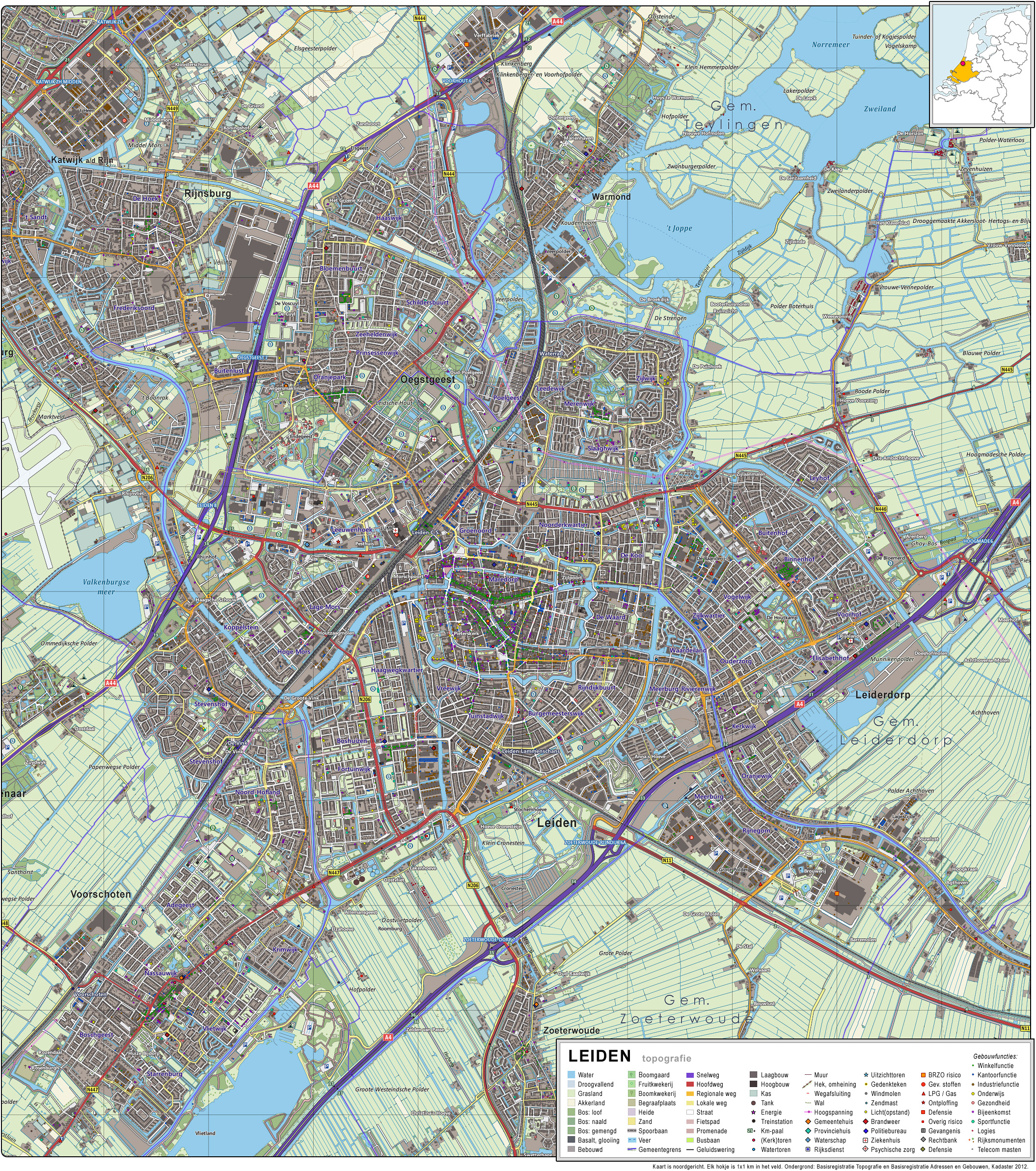 Topografisch beeld van de stad Leiden. Op basis van de GML open geodata van de BRT/Top10NL (basisregistratie Topografie, Kadaster 2012), vrijgegeven door Kadaster op 30-11-2012 onder de Creative Commons BY licentie. Gebouwvlakken vanuit Open Geodata BAG extract (december 2012). Samenstelling en kleurenschema: Jan-Willem van Aalst, met QuantumGIS en Photoshop.